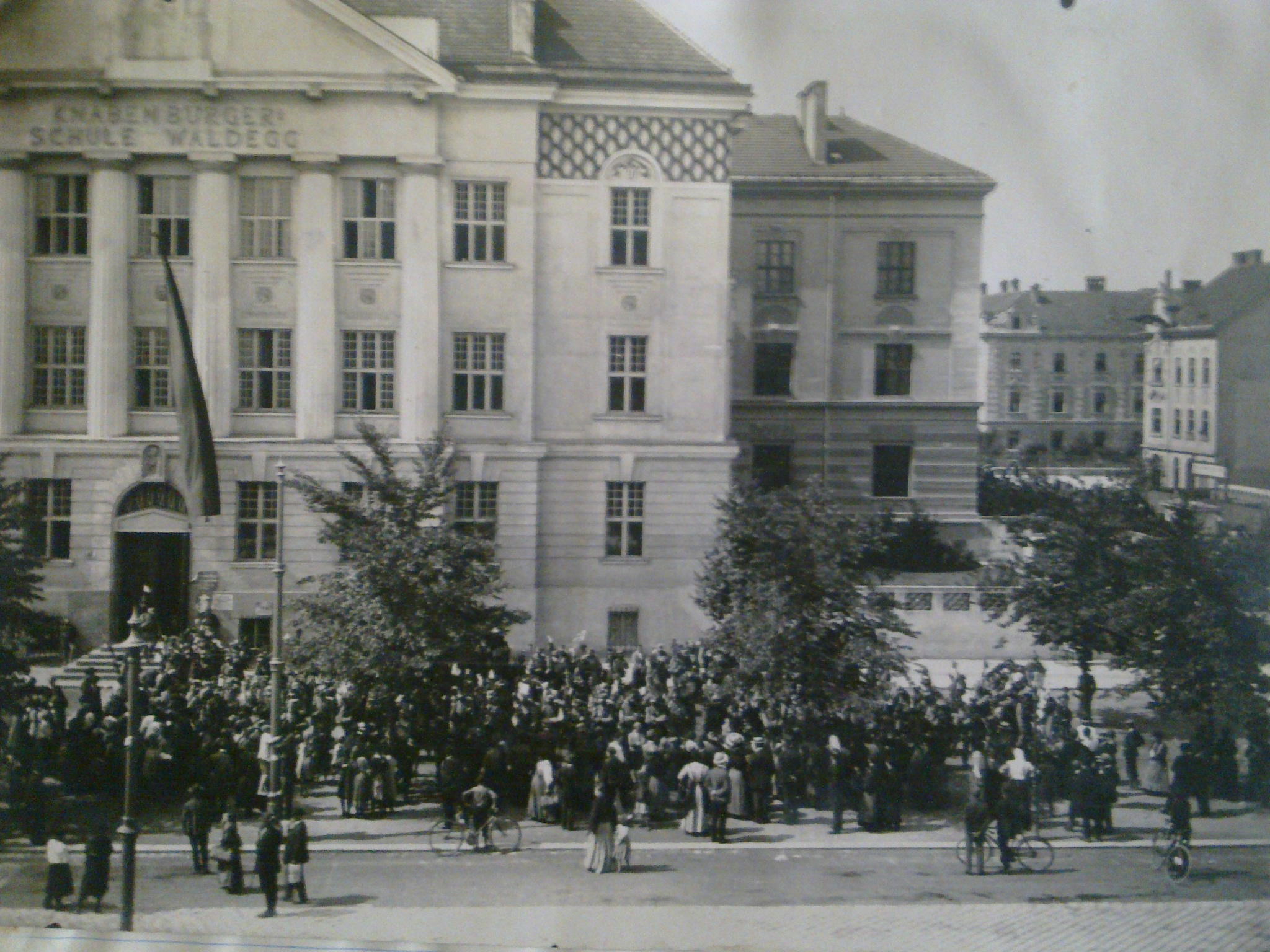 Dieses Foto zeigt die Eröffnung der Dürnbergerschule aus dem Jahr 1902